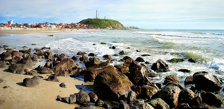 Praia da Cal, Torres, Rio Grande do Sul, Brasil.